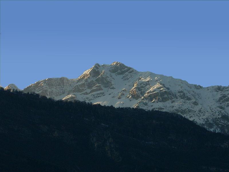 Il monte Stivo visto da Rovereto